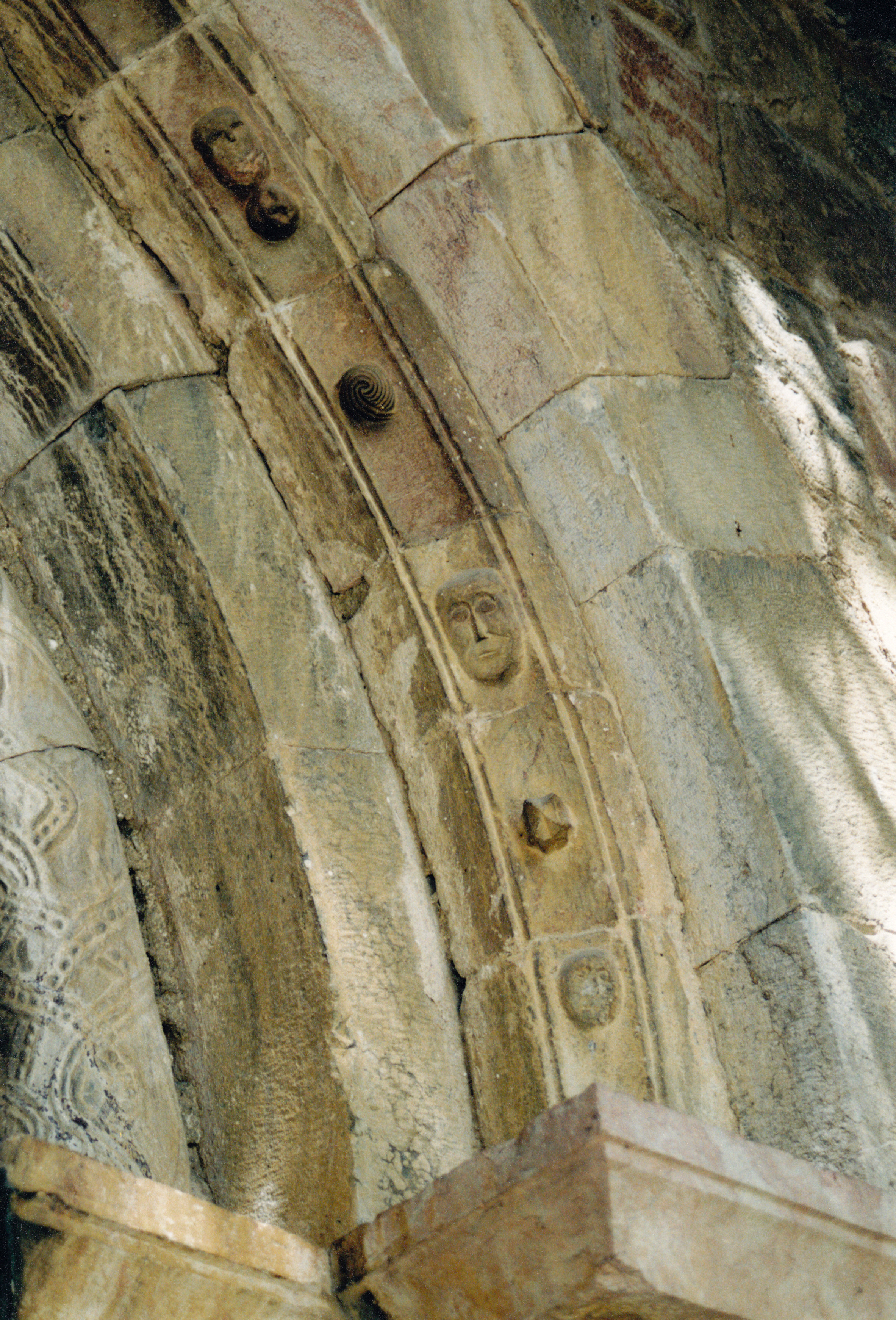 France - Pyrénées-Orientales - Conflent - Chapelle Saint-Vincent d'Eus